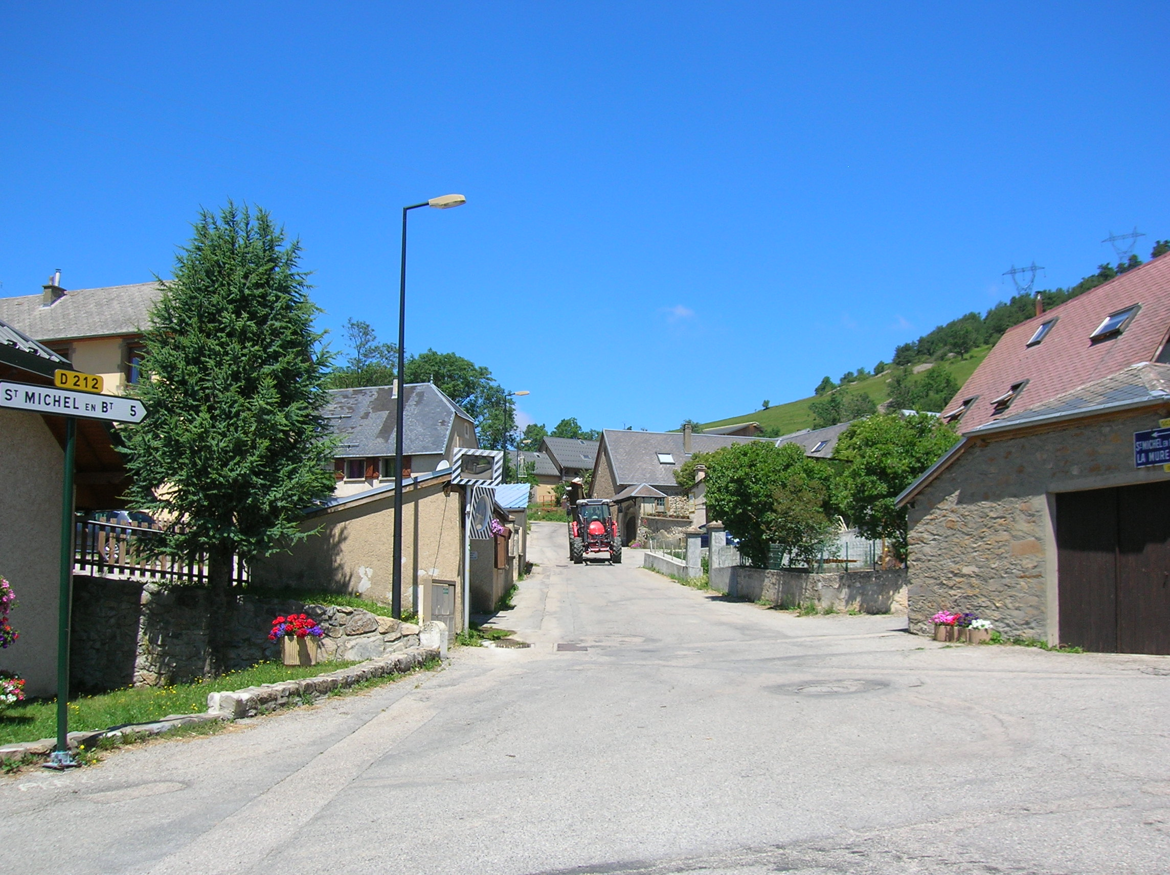 Sainte-Luce, Isère, France.